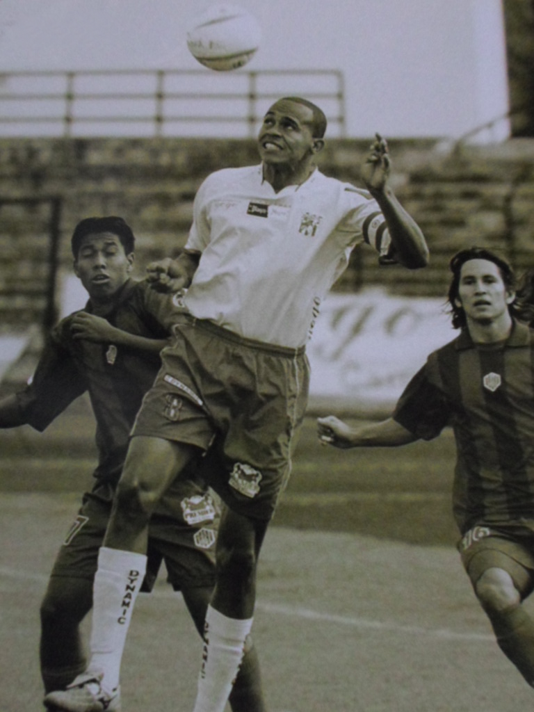 Encuentro entre el Bogotá FC y el Union Magdalena en el estadio Edyardo Santos de la Universidad Nacional.